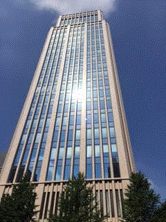 オンズ本社正面